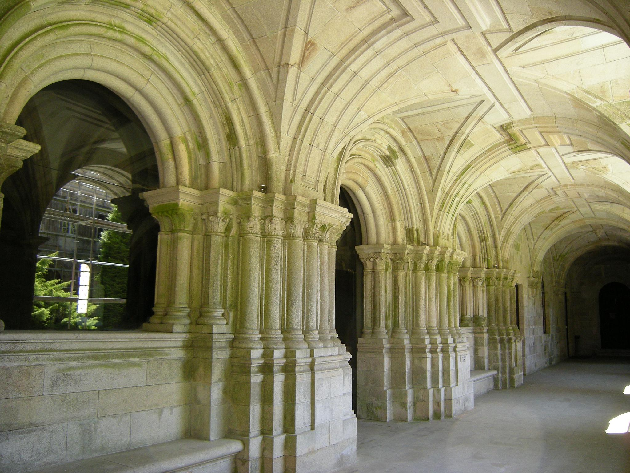 Entrada a la Sala Capitular.